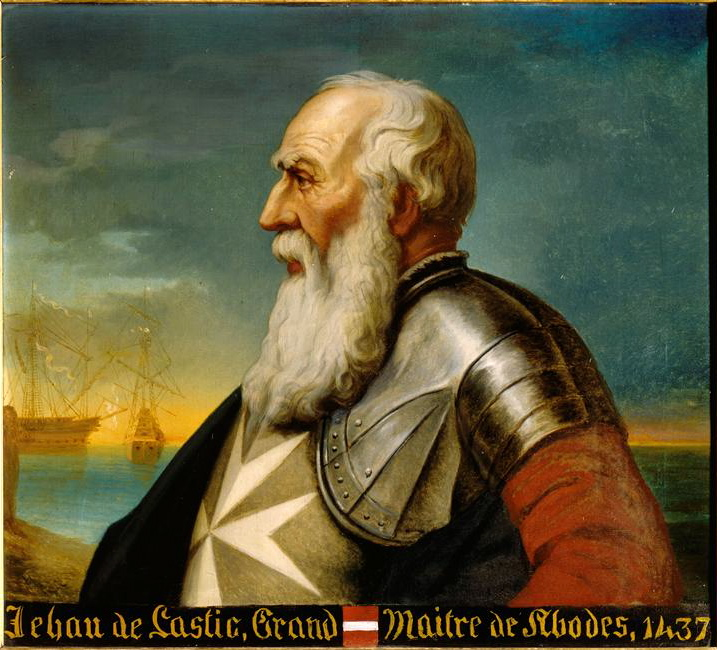 Fra Jean de Lastic (1371-1454), 36. Großmeister des Malteserordens